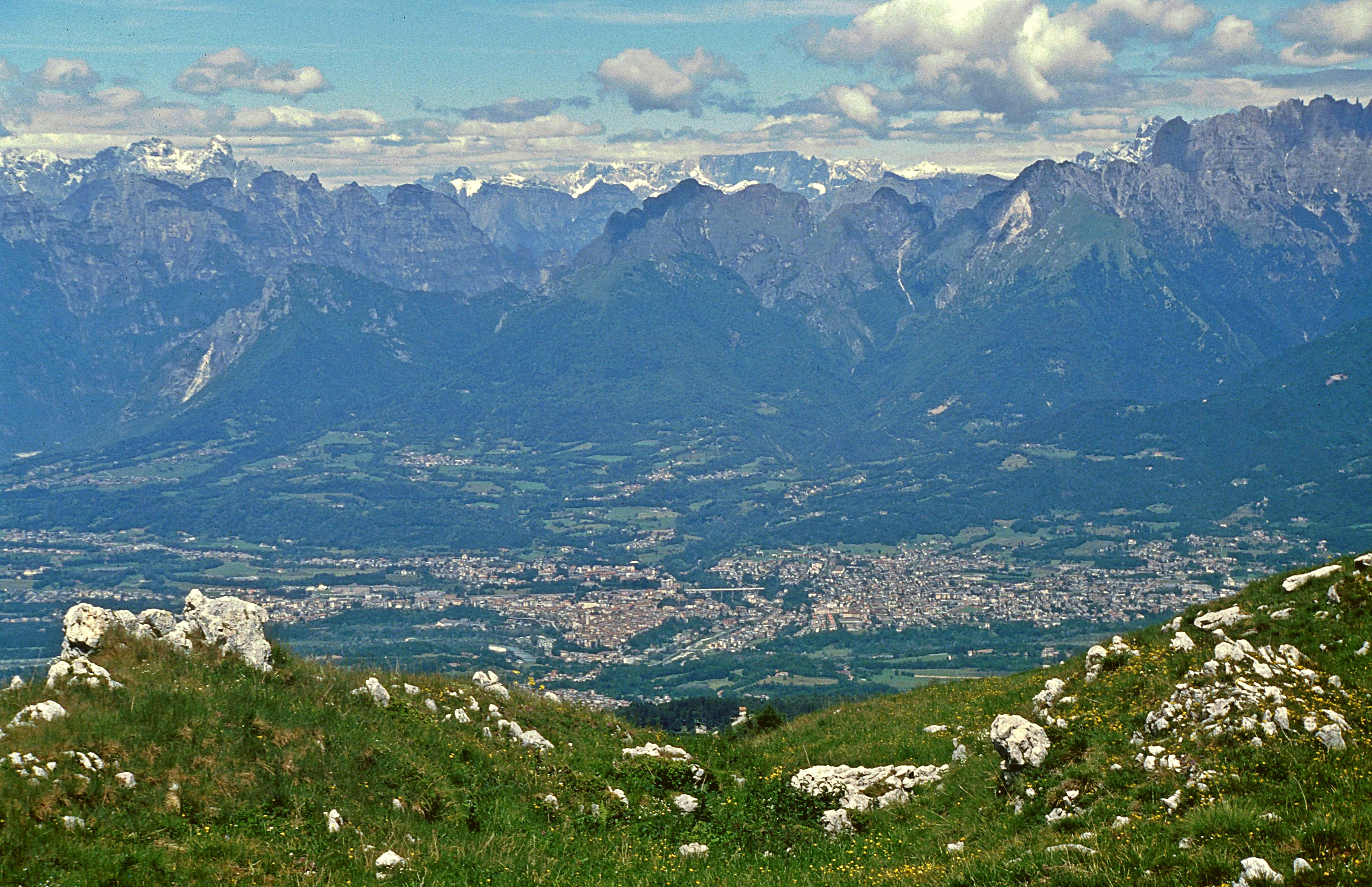 Blick vom Nevegal auf die Dolomiti Bellunesi und das Piave-Tal